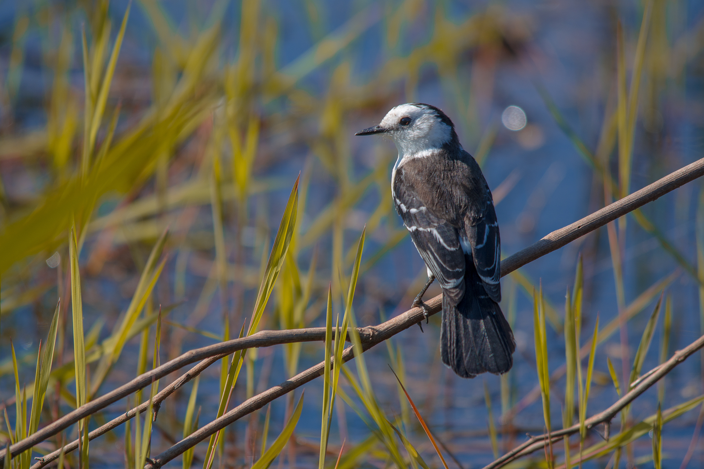 Ave lavadeira-de-cara-branca macho pousada às margens de um corixo no Pantanal Sul.